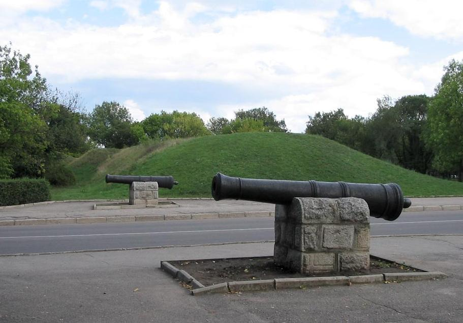 Гармати і вали Фортеці Святої Єлисавети в Кіровограді